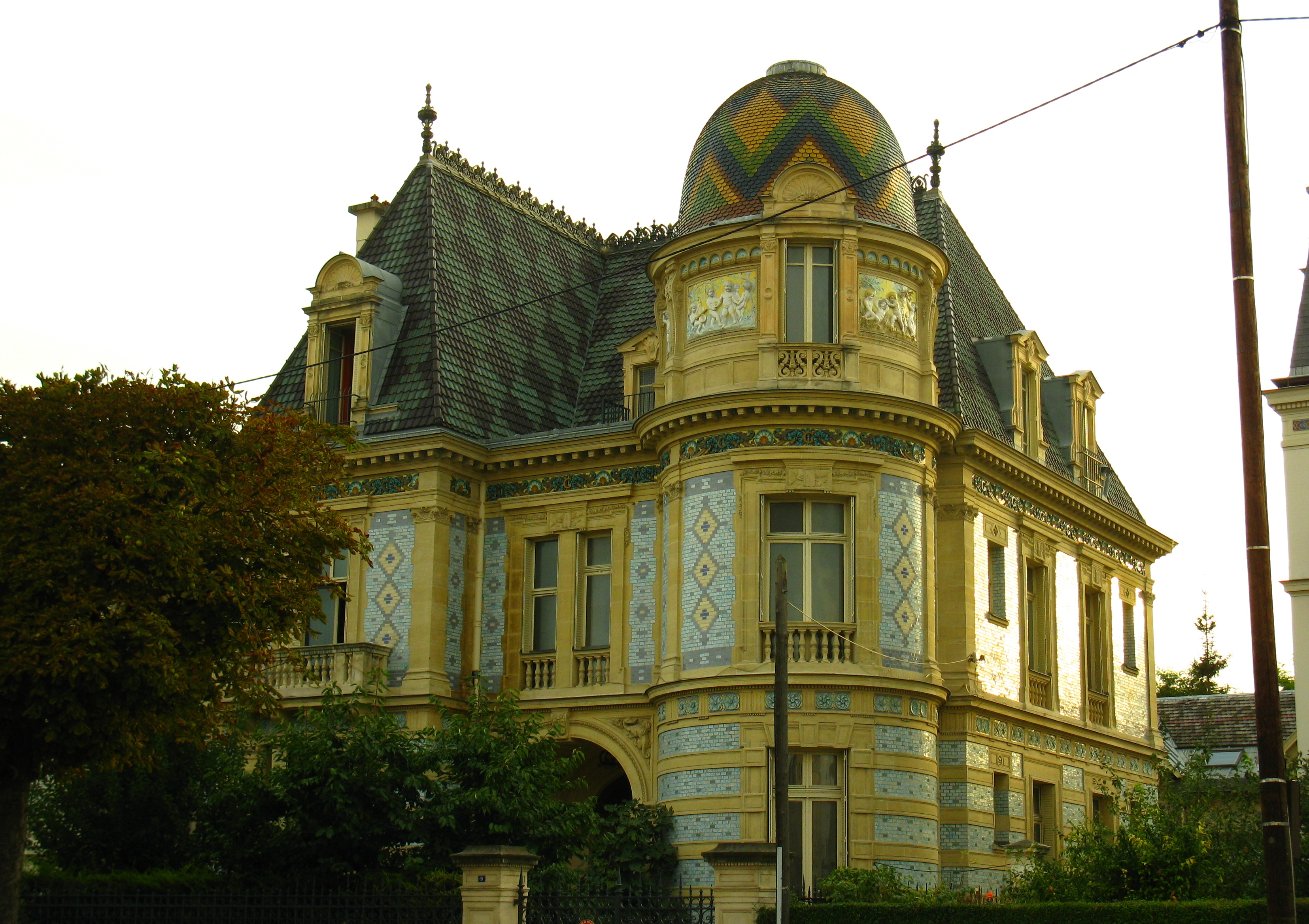 Vue de côté de la maison Gilardoni, à Thiais (94) .